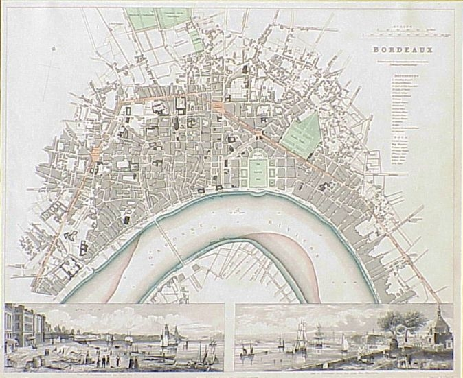 Plan de la ville de Bordeaux en 1840. En rouge : anciens murs de la ville. En vert : la place des Quinconces et le Jardin Public. On distingue le pont de Pierre, seul pont bordelais sur la Garonne, achevé depuis 1822.